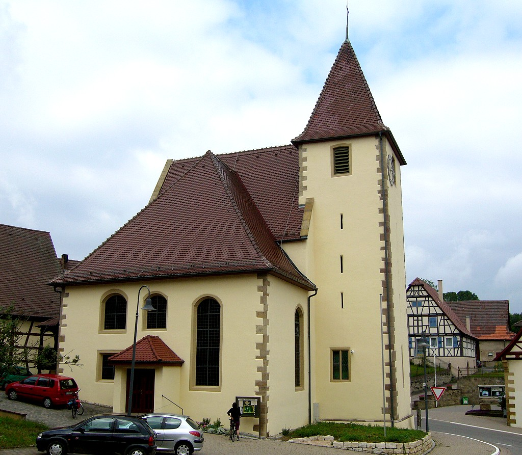 Die evangelische Dorfkirche von Dürrn